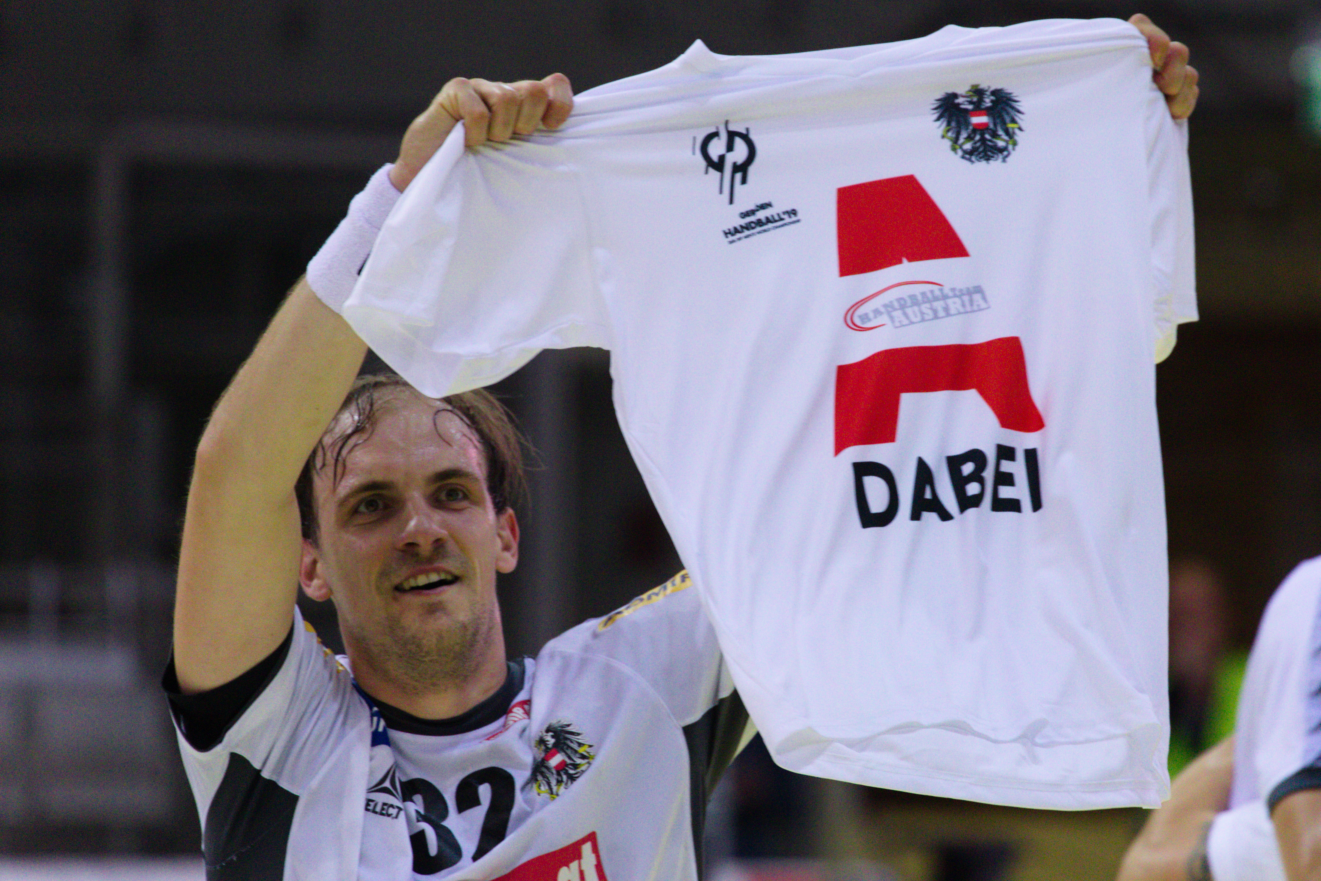 Handball-WM-Qualifikationsspiel zwischen Österreich und Weißrussland in Wien, 13. Juni 2018: Gerald Zeiner mit A-Dabei-T-Shirt